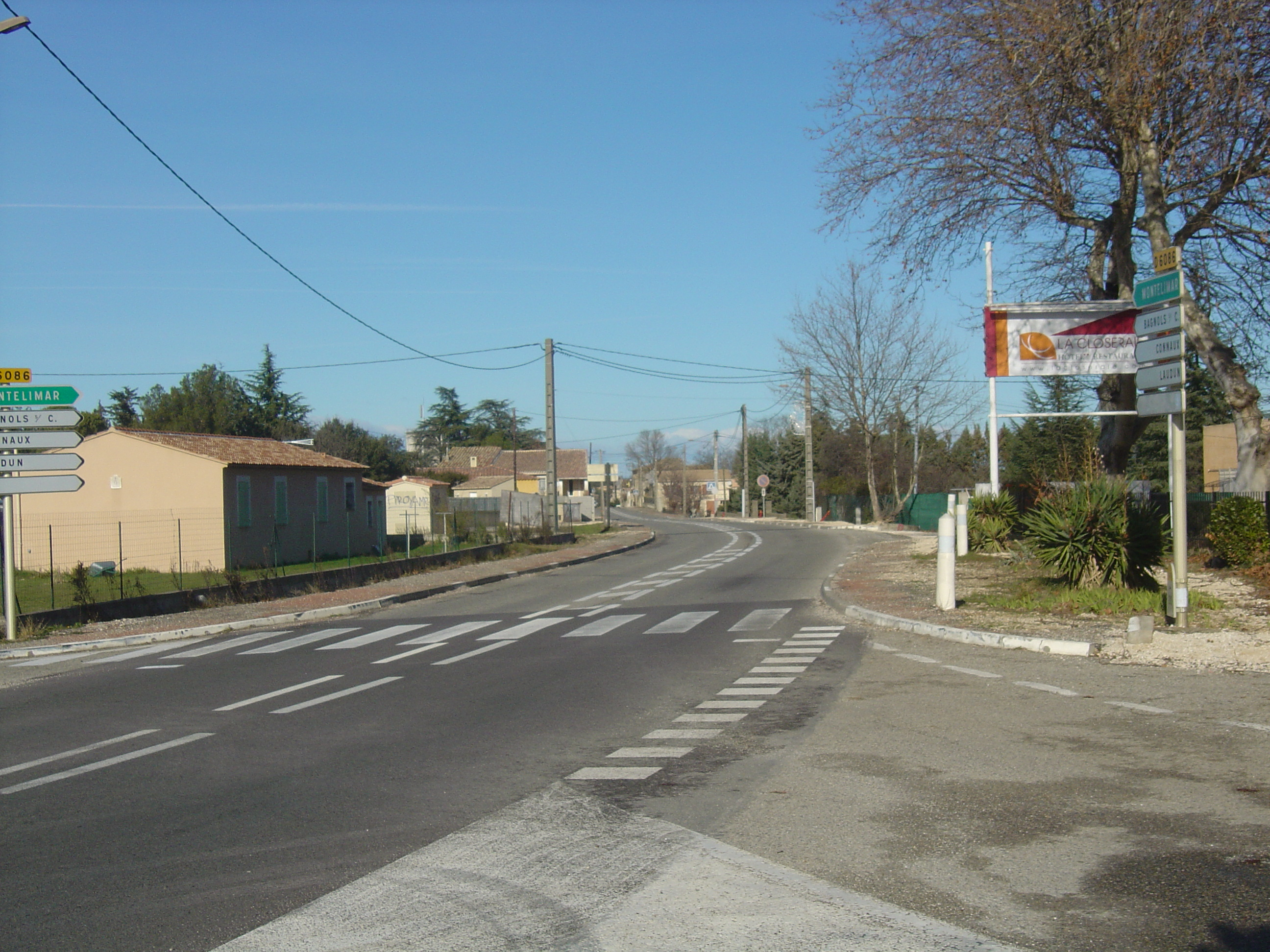 Pouzilhac (30), village partagé en deux par la route D6086 entre Bagnols-sur-Cèze et Remoulins